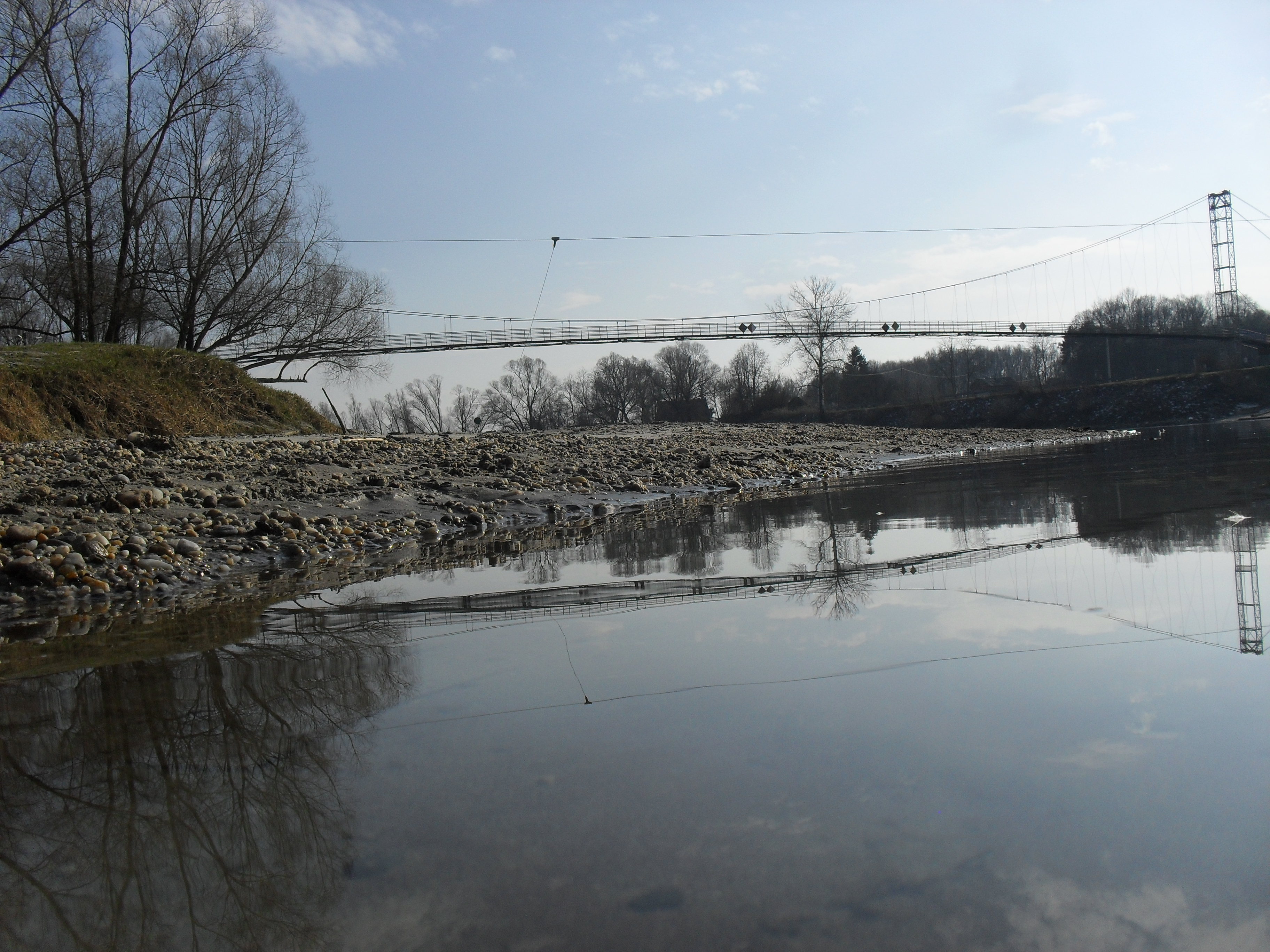 pješački most